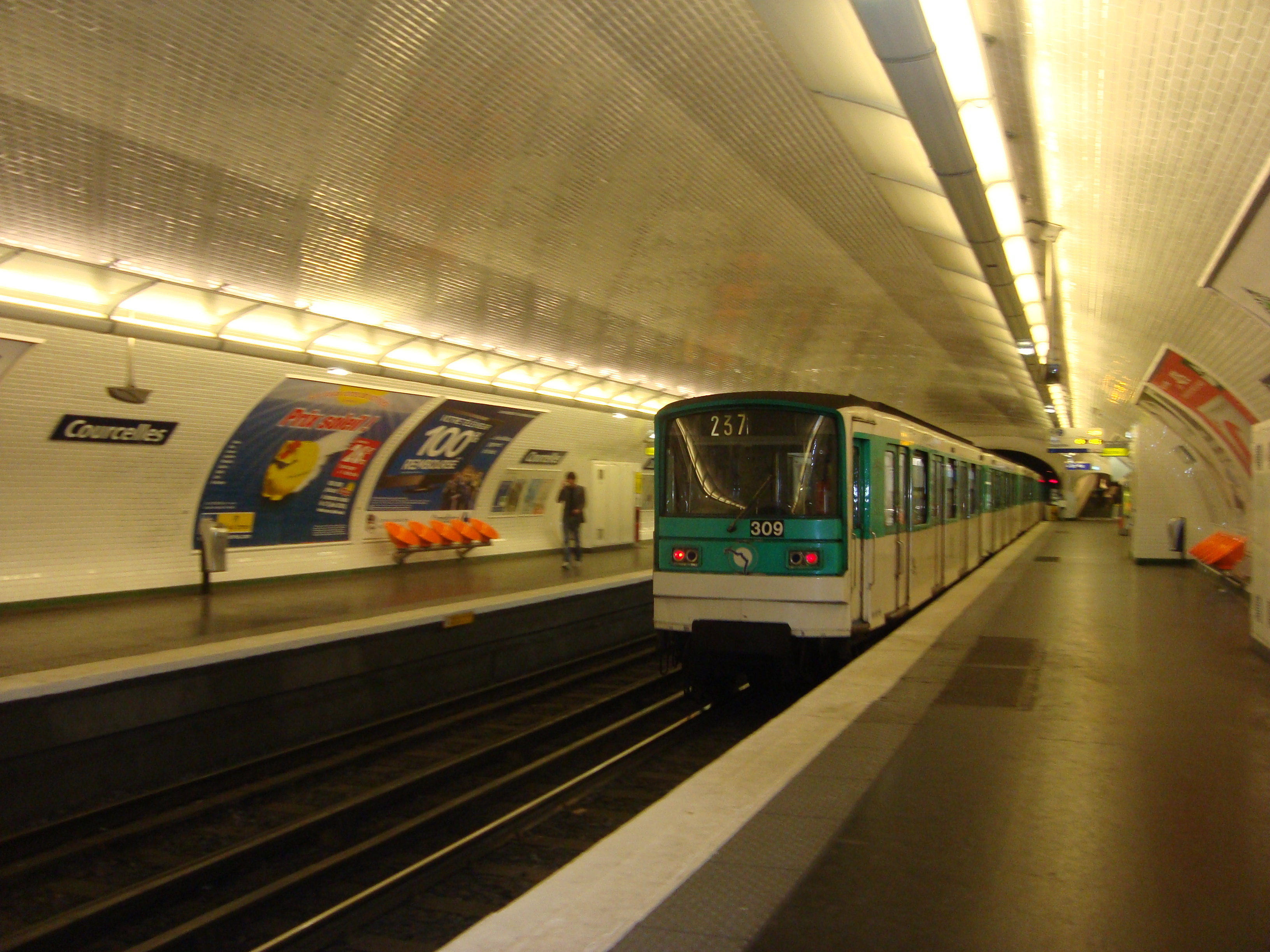 Rame de métro quittant la station Courcelles.